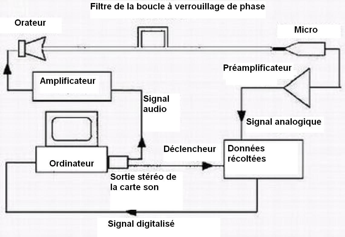 L’expérience Mach c, comme son nom l’indique, implique des impulsions sonores supraluminiques. Elle aurait été réalisée par le Docteur William Robertson de la Middle Tennessee State University en janvier 2007 grâce à un dispositif électroacoustique construit par lui-même et ses étudiants. Comme la plupart des expériences dans ce domaine, elle peut être interprétée soit par une vitesse de groupe dépassant la vitesse de la lumière, soit par une vitesse de groupe négative. Selon William Robertson, l’expérience ne contrevient pas à la relativité d’Einstein, même si, dans la théorie du signal (interaction sur les déphasages et en forçant les ondes à interférer d’une façon bien définie), un signal sort en effet du dispositif avant d’y être vraiment rentré. L’expérience de Robertson est une confirmation de plusieurs théories, notamment celle de Joel Mobley (université du Mississippi). Ce résultat est analogue à ceux mettant en jeu l’effet tunnel avec de la lumière ou des ondes électromagnétiques et ne se borne pas uniquement à la physique quantique.